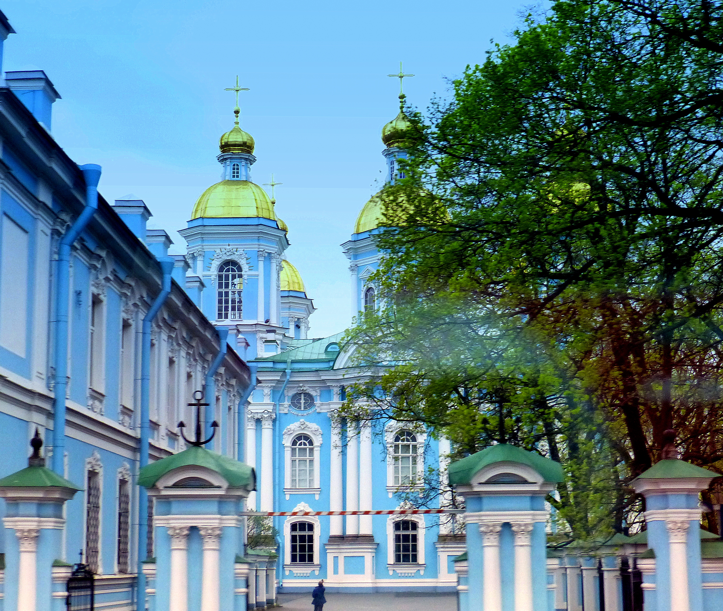 St. Petersburg - Nicholas' Naval Cathedral --- Морской Николая собор